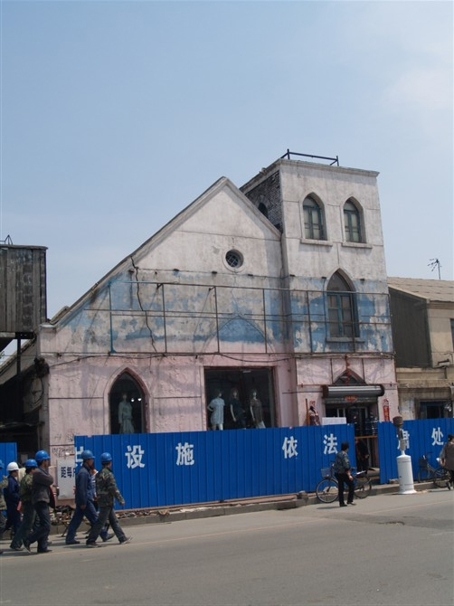 北门里教堂原貌